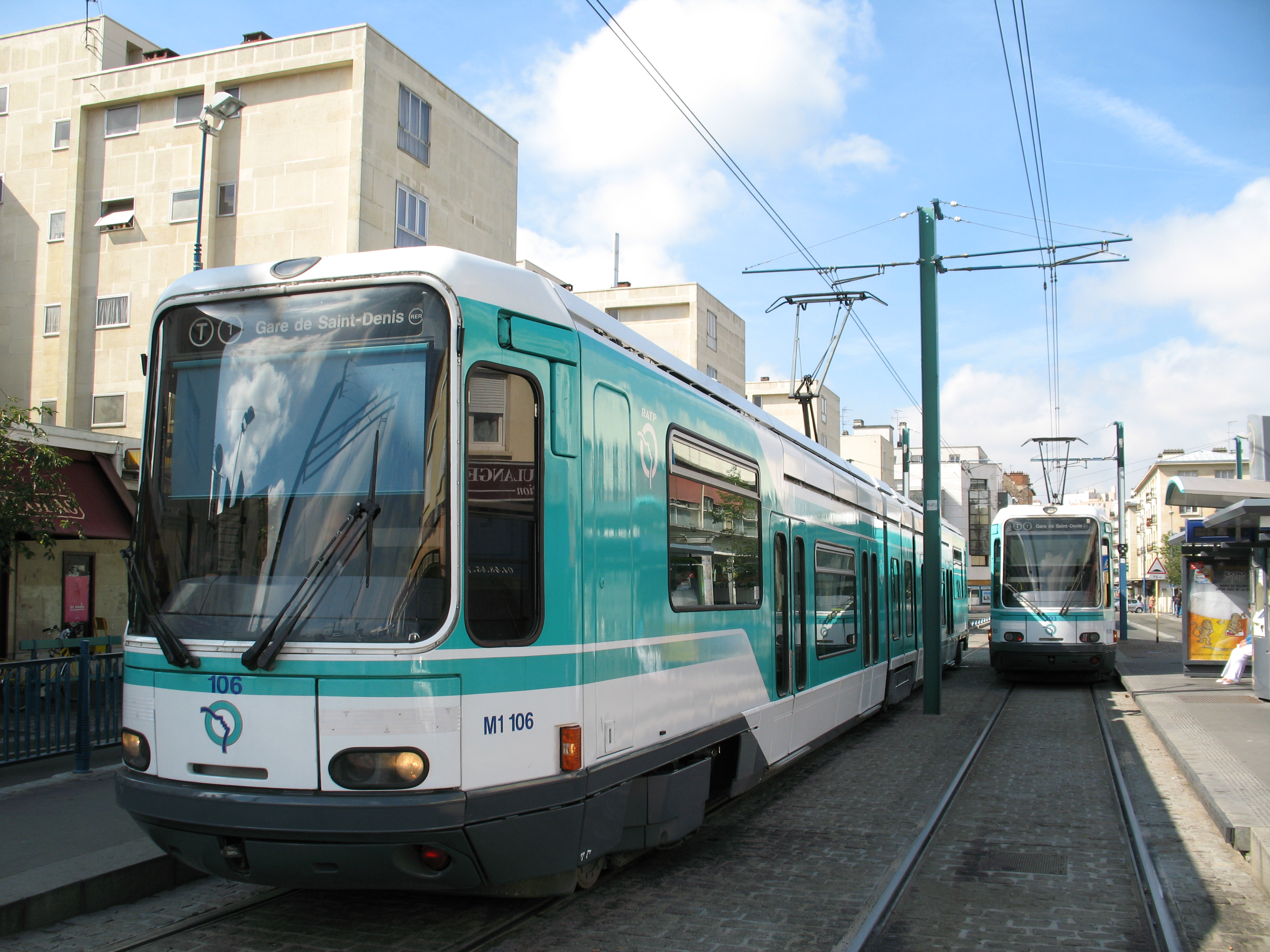 Alstom TFS au terminus Noisy-le-Sec, ligne 1 du tramway d'Île-de-France.